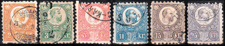 1871-1872 second stamp issue of Hungary, engraved.